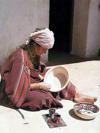 djerba potier